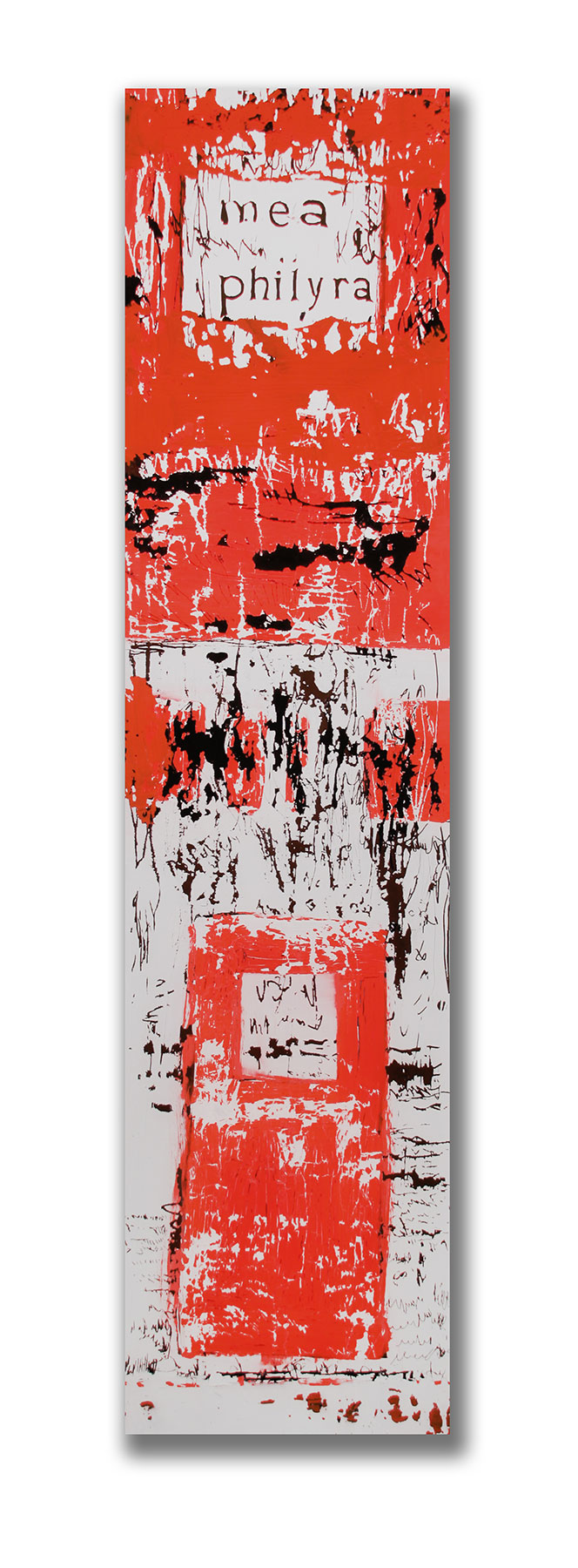 Werk Mea Philyra des Künstlers Edwin Wiegele